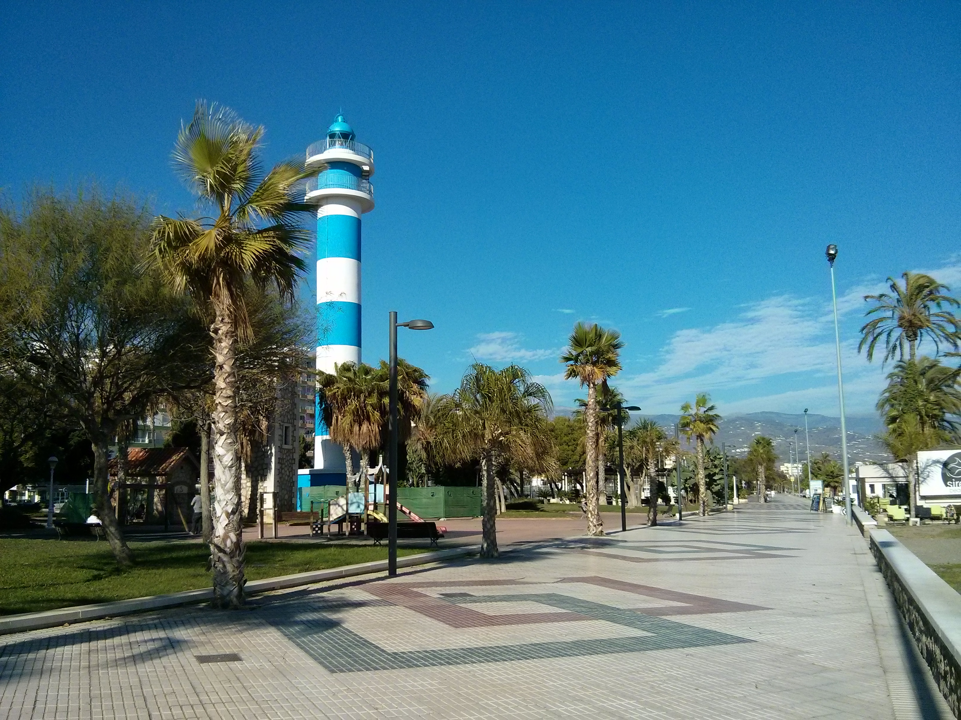 Torre del Mar